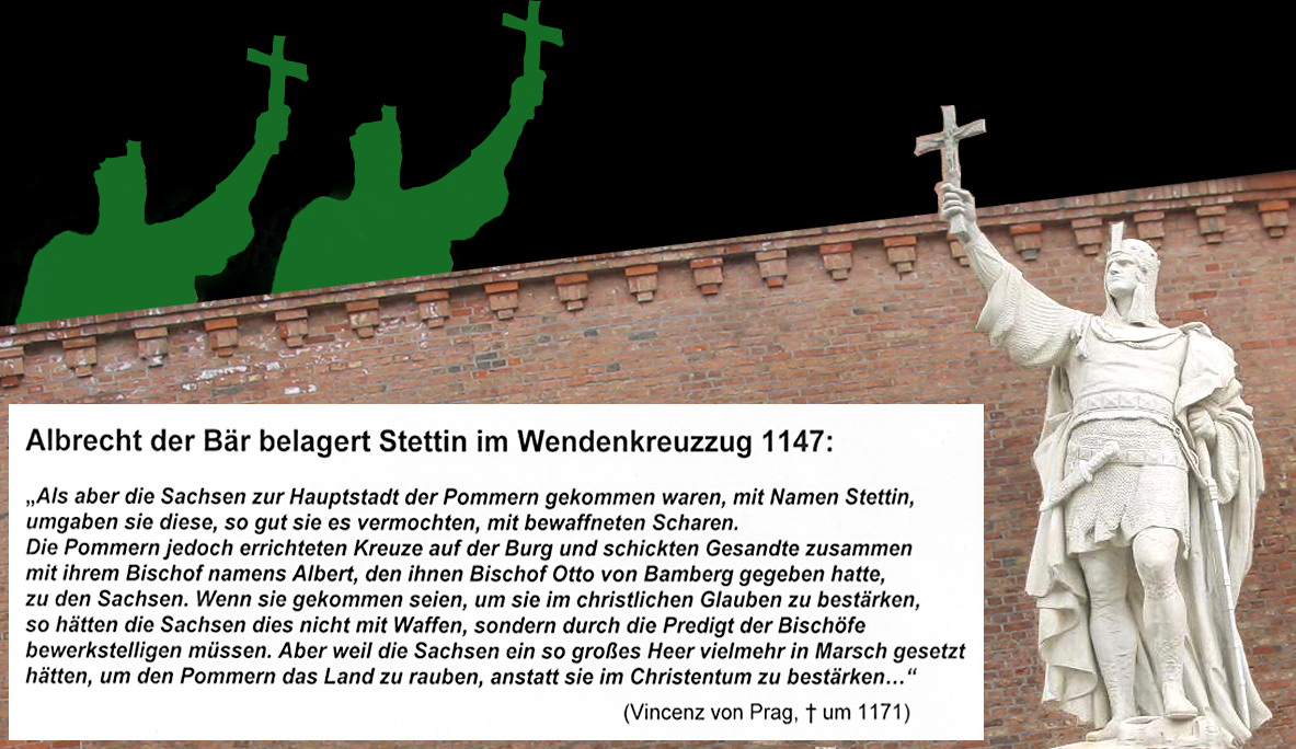 Die Collage zeigt Albrecht den Bären (eigenes Foto der Denkmalsstatue aus der Siegesallee, zur Zeit in Berlin-Spandau) bei der Belagerung von Stettin im Wendenkreuzzug 1147. Die Belagerten sind spiegelbildliche Kopien Albrechts. Aus dem beigefügten Quellen-Text wird deutlich, dass Albrecht nicht die Kultur in Form des Christentums bringt, weil die Bewohner bereits seit 1128, also fast einer Generation, christianisiert sind. Die Collage soll die Verlogenheit der Kulturträger-Theorie entlarven.